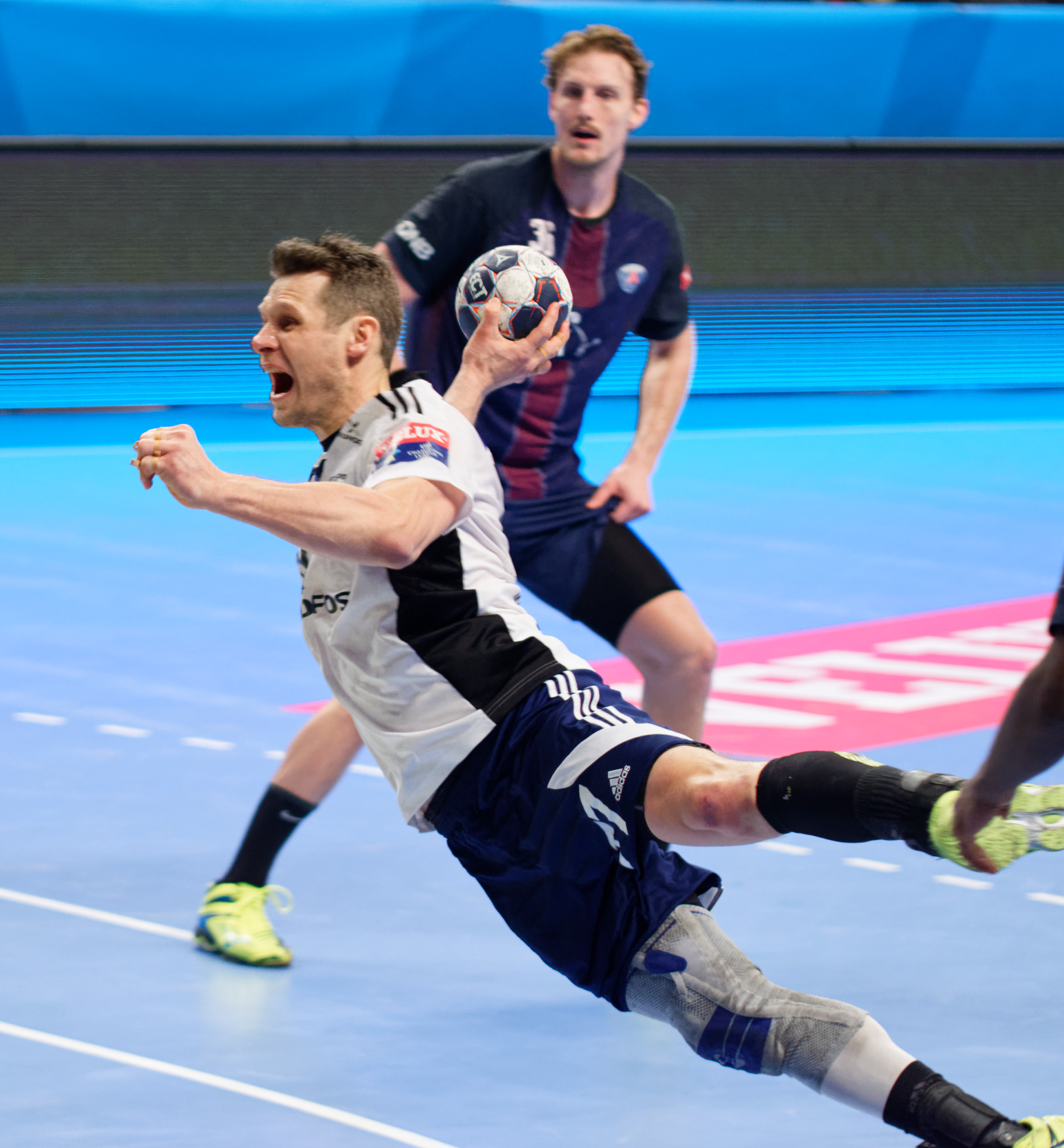 Rencontre de phase de groupe de la ligue des champions 2016-17 entre le PSG et Bjerringbro-Silkeborg. A Coubertin, le 11 février 2017.